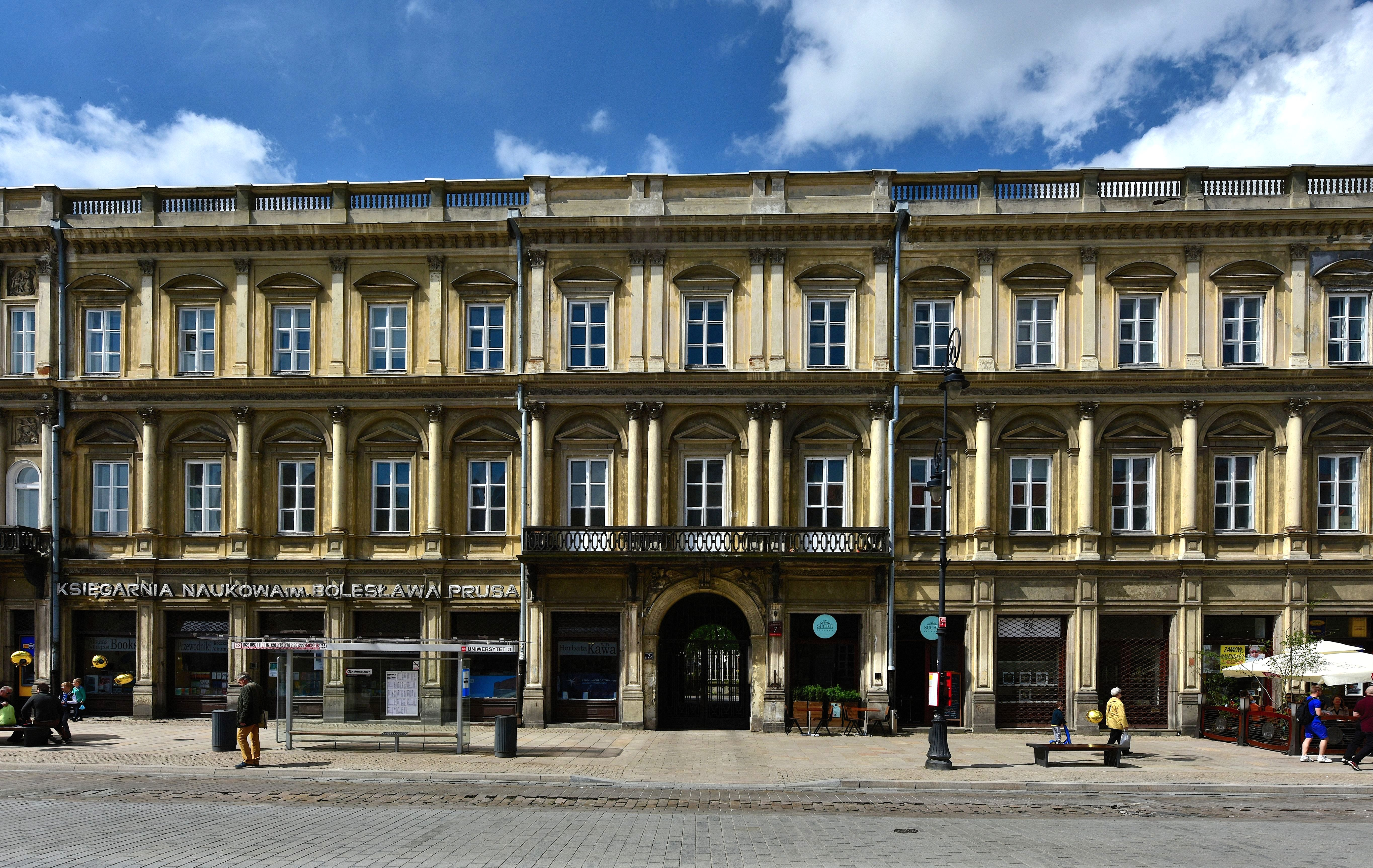 Kamienica Józefa Grodzickiego przy ul. Krakowskie Przedmieście 7 w Warszawie